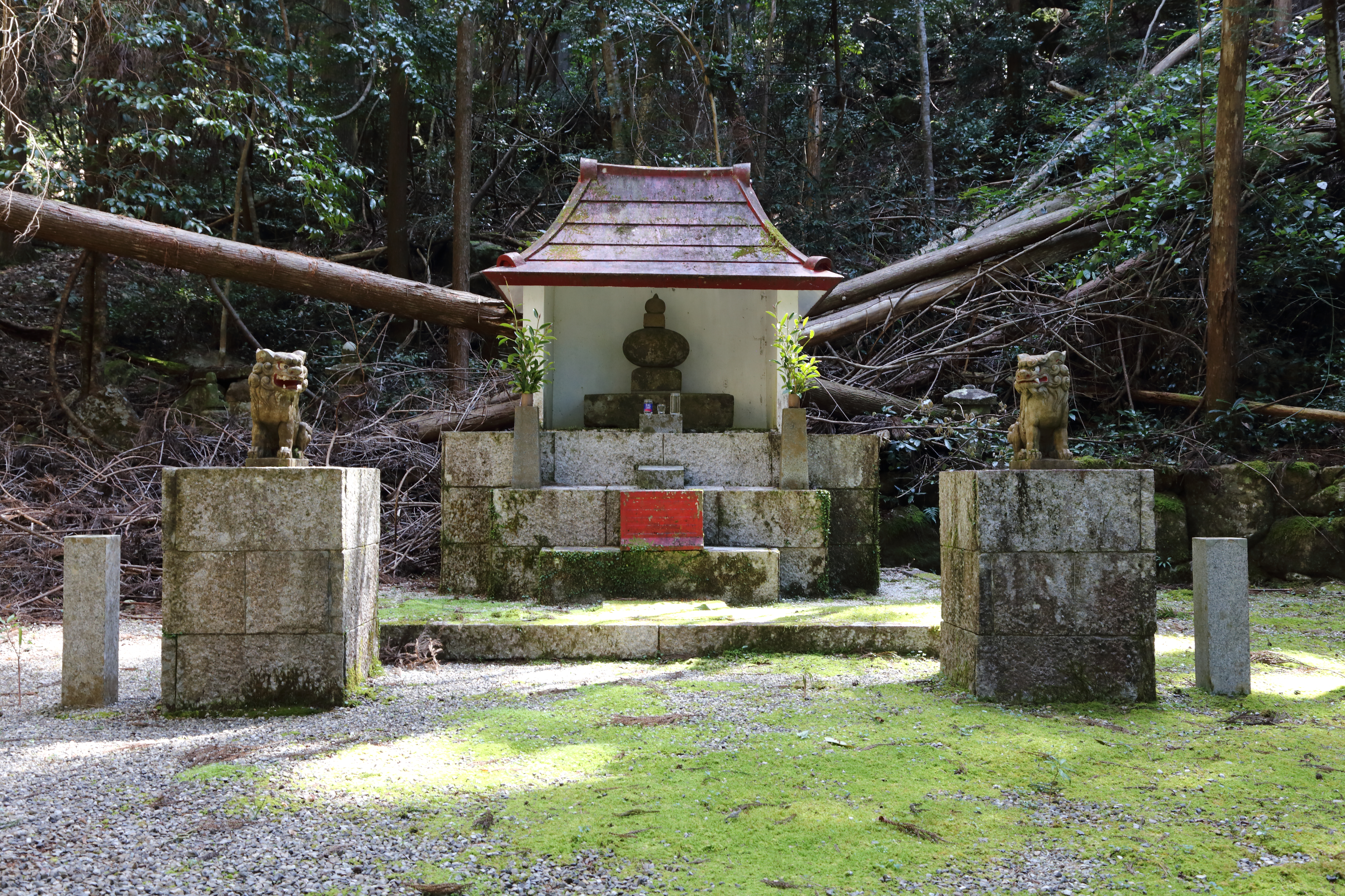 大河内神社 三重県熊野市紀和町大河内 紀和町大河内